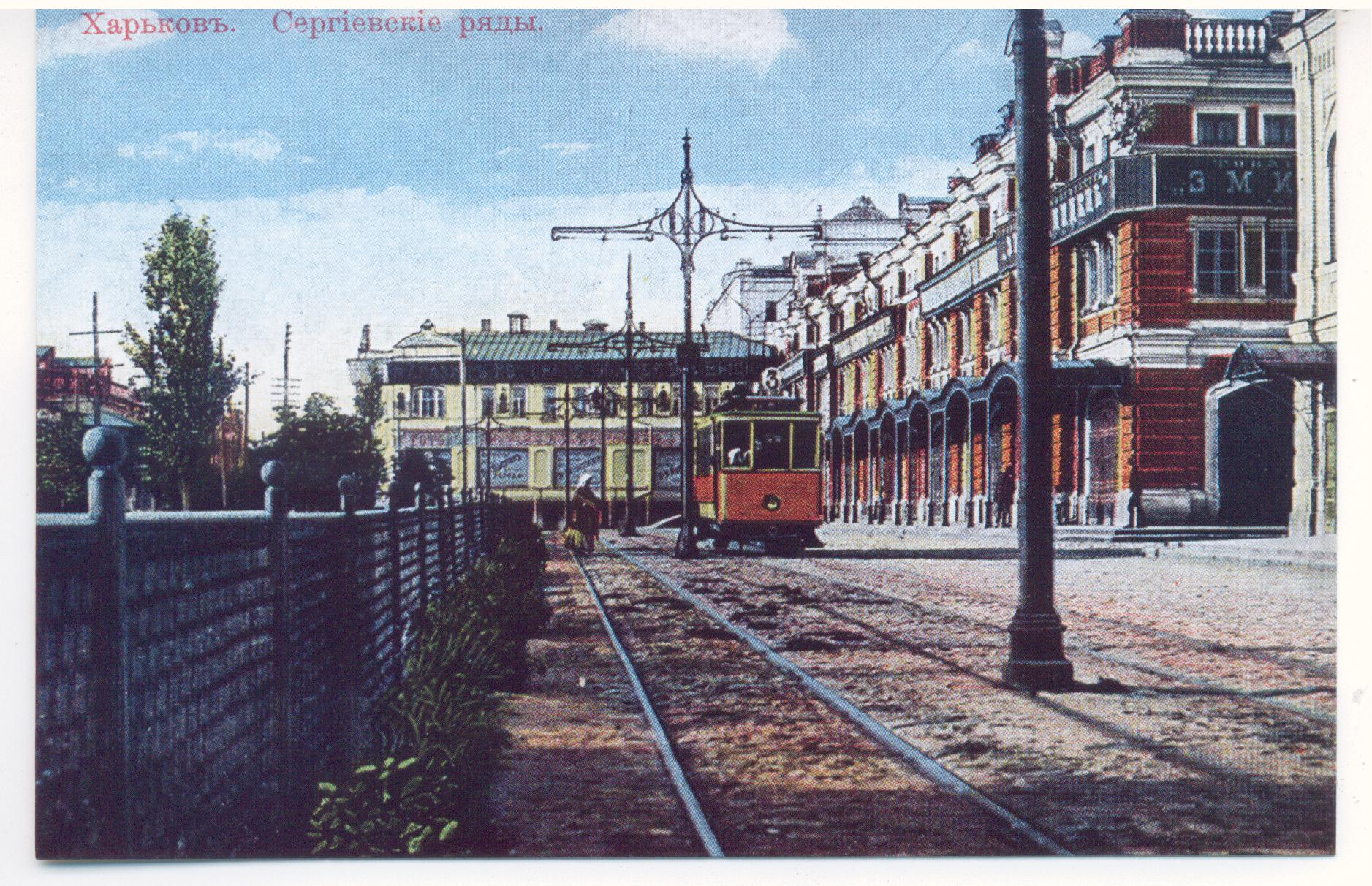 Вид на Сергиевской площади вдоль Сергиевского ряда до Купеческого спуска.